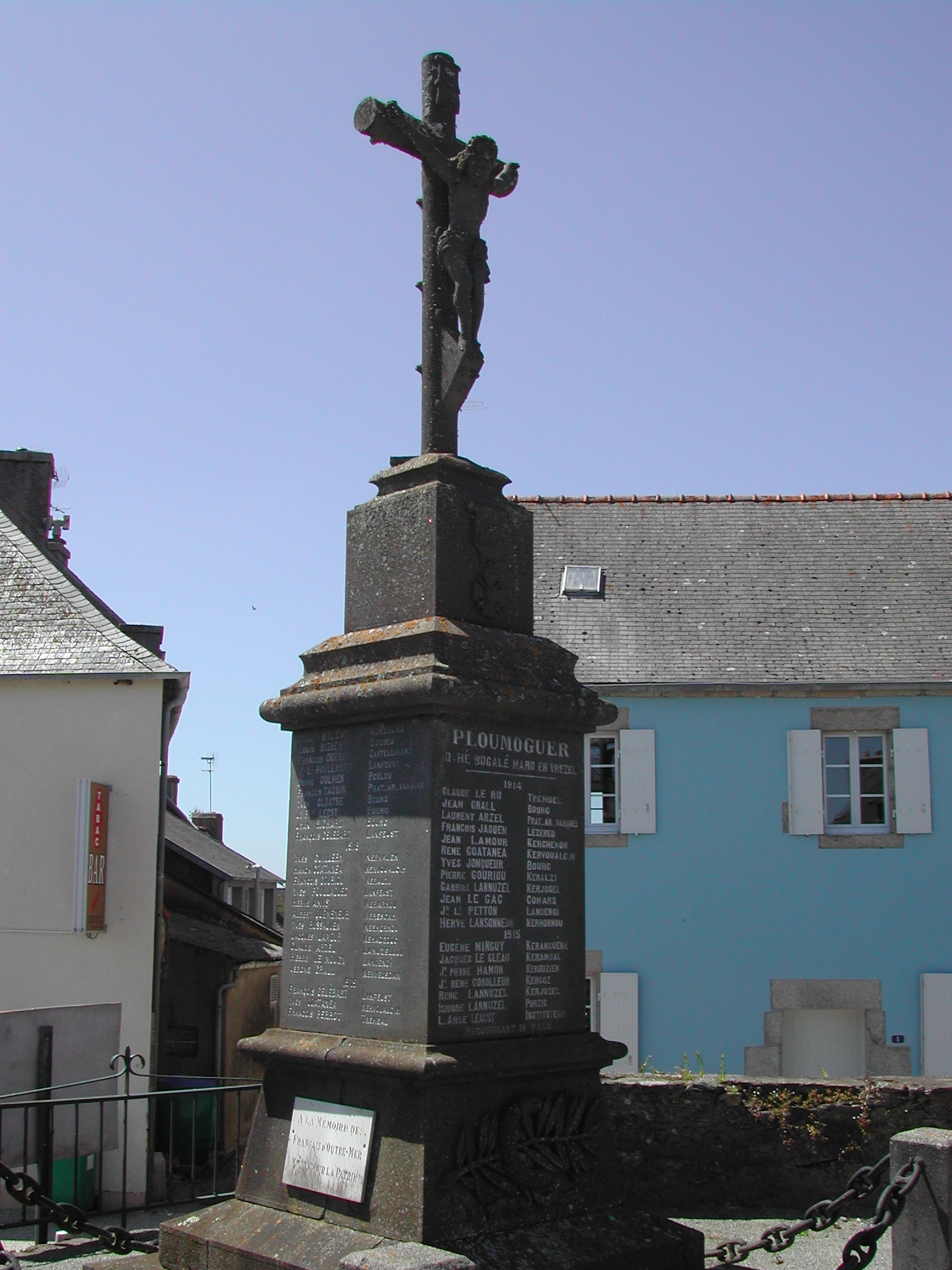 Monument aux morts - Ploumoguer-29